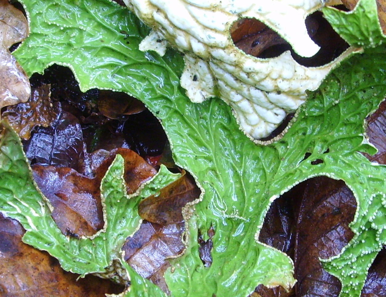 Lobaria pulmonaria, thalle humide, bois du Larincq (Monein, Pyrénées-Atlantiques, Béarn, France)